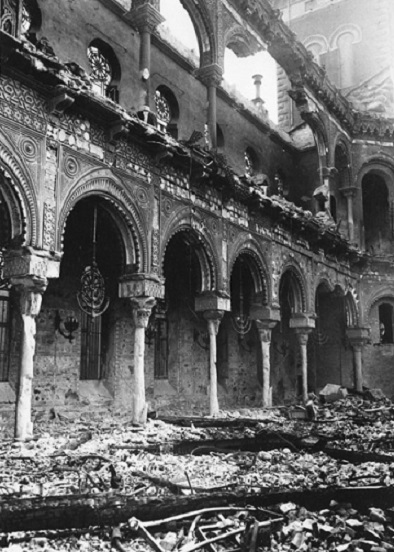 La sinagoga di Torino dopo il bombardamento della città del 20-21 novembre 1942